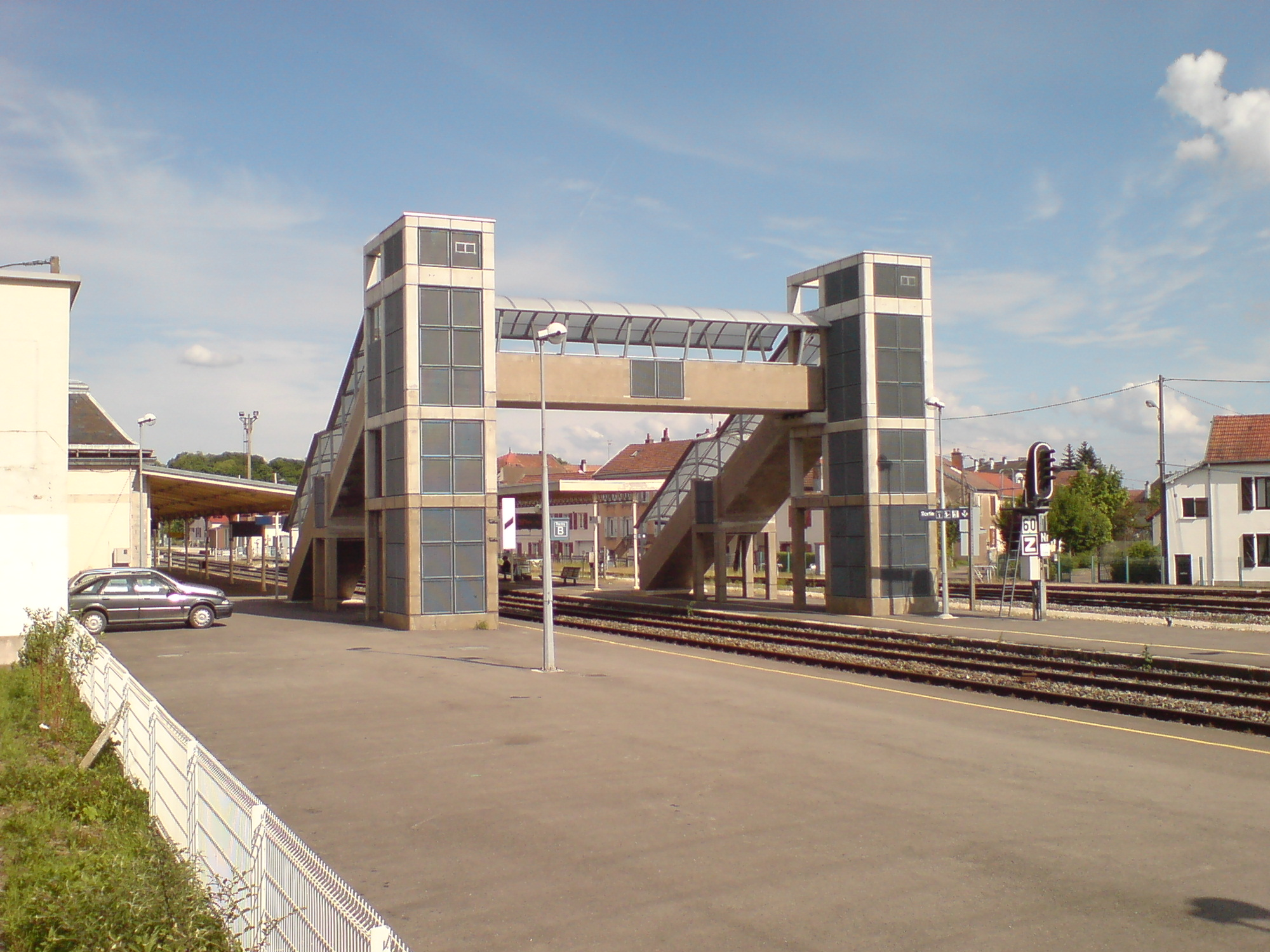 La passerelle de la gare date de 2006